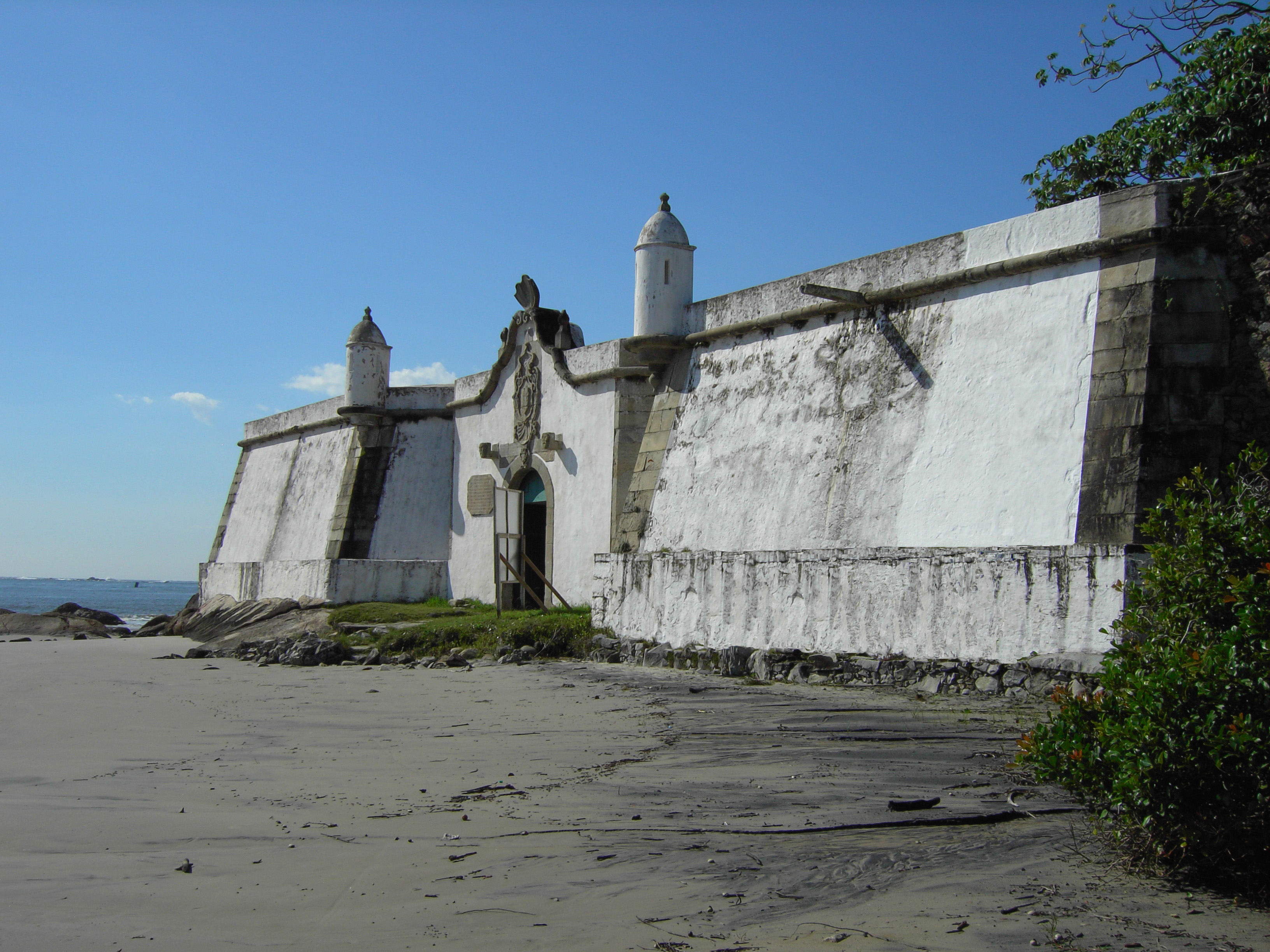 Forte na Ilha do Mel, Paranaguá-PR